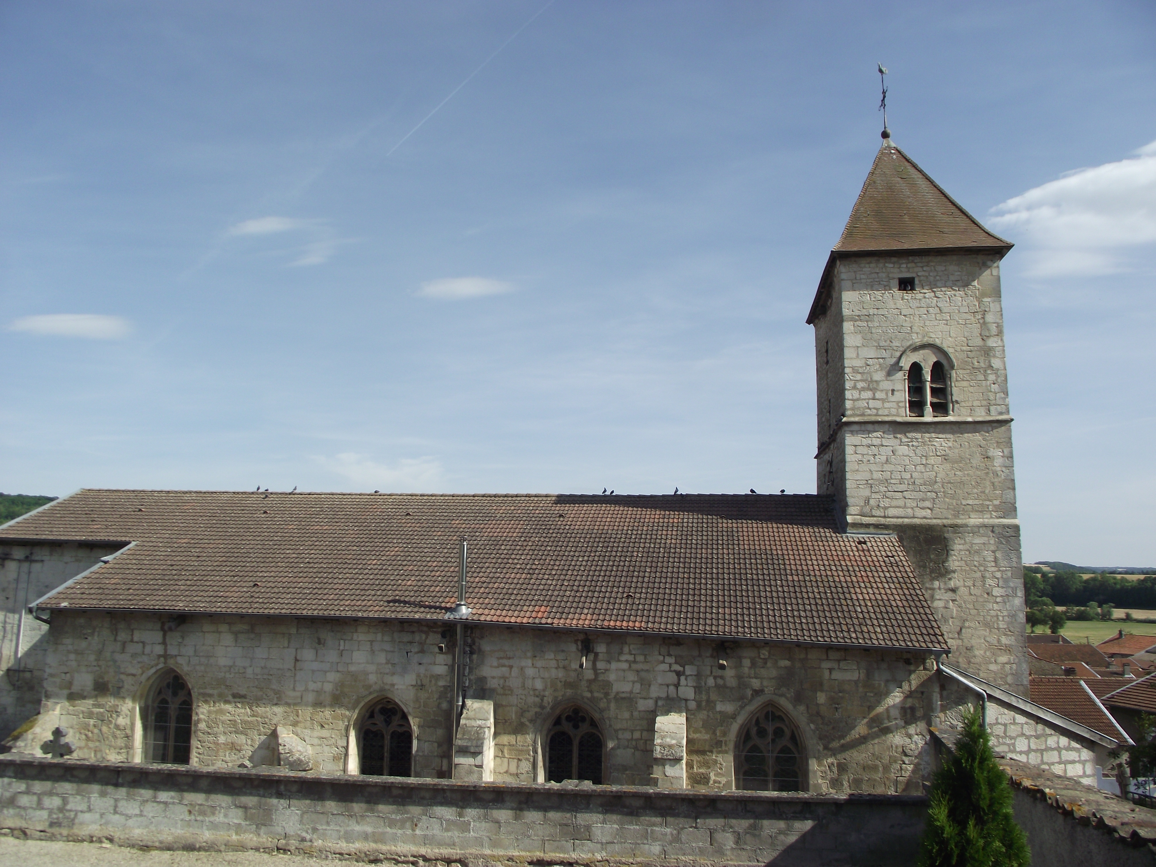 Église Saint-Grégoire-le-Grand à Pagny-la-Blanche-Côte (vue de coté)